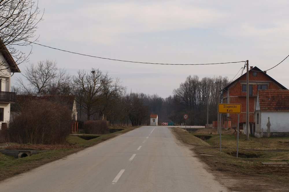 Ulaz u selo Stupnički Kuti, Brodsko-posavska županija.